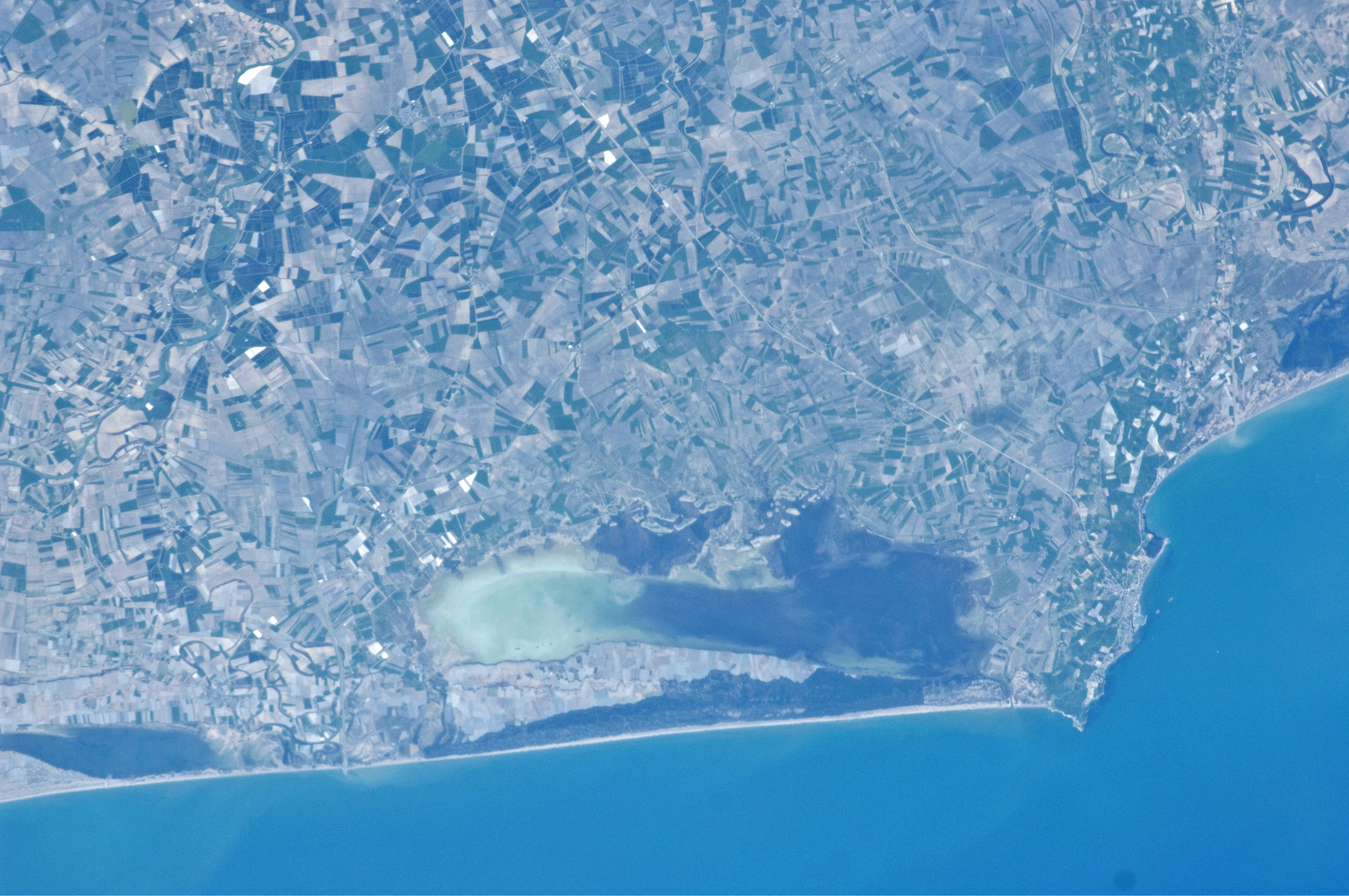 Çukurova'da bulunan Akyatan Gölünün, 2011.03.16 tarihinde, 344 km yükseklikten NASA tarafından çekilmiş uzay fotoğrafı.